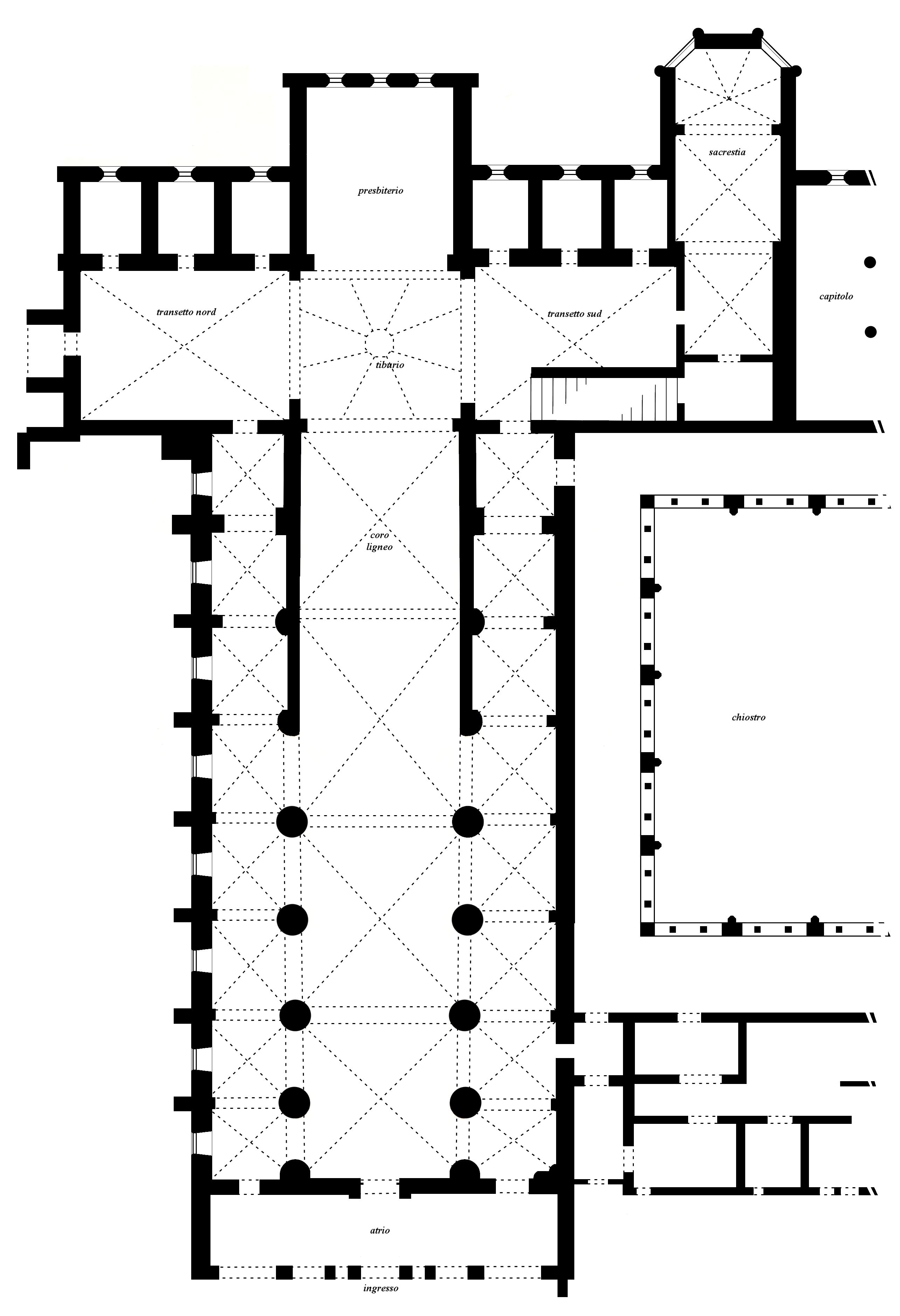 Planimetria della chiessa dell'Abbazia di Chiaravalle a Milano. Da me realizzata su base delle planimetrie di vari libri d'arte; purtroppo la planimetria non rispetta perfettamente le proporzioni reali (spessore dei muri, etc) ma è quanto di più fedele è stato possibile fare senza l'uso di software professionali. Yoruno